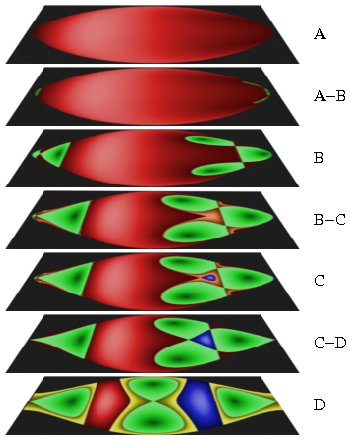 Poincaré maps of the Kovalevskaya top